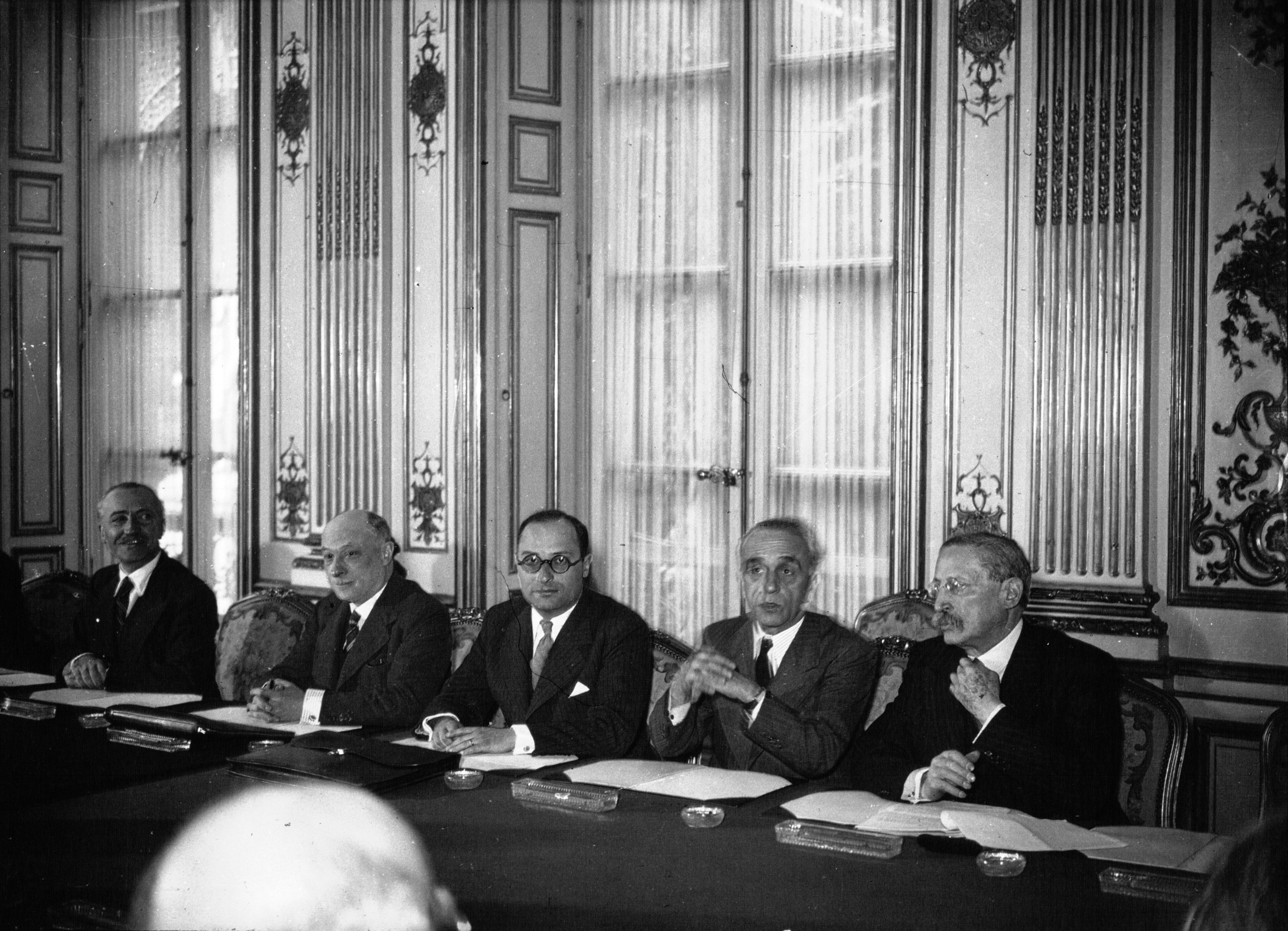 Le nouveau ministère formé par M. Chautemps à l'Hôtel Matignon : de droite à gauche M.M. Blum, Faure, Zay, Rucart et Brunet : 1937